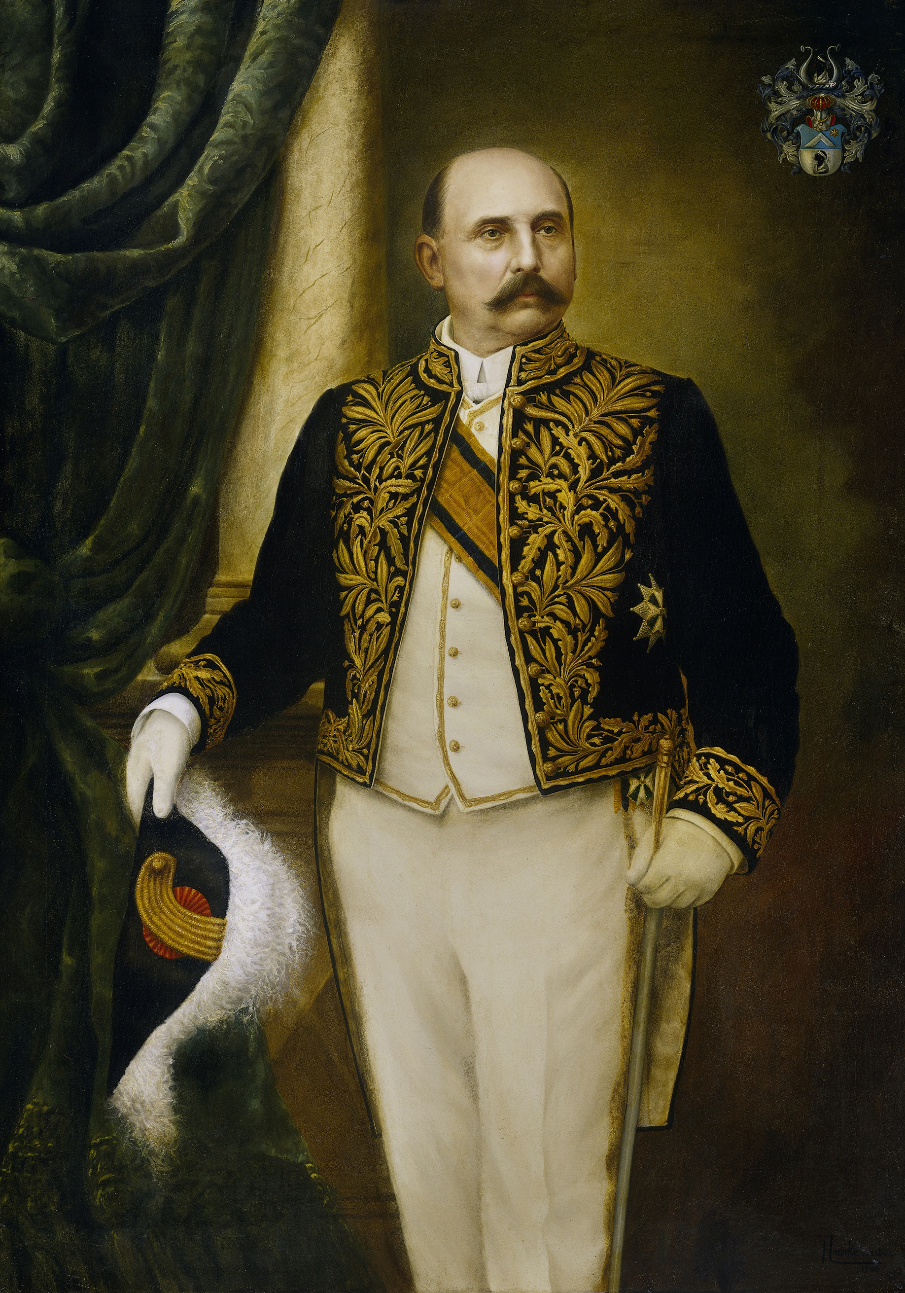 Portret van Johannes Benedictus van Heutsz (1851-1924). Gouverneur-generaal (1905-1909). Kniestuk, staande, het hoofd iets naar rechts gekeerd. De steek in de rechterhand, een wandelstok in de linkerhand. Rechtsboven het familiewapen. Onderdeel van een reeks van portretten van de gouverneurs-generaal van het voormalige Nederlands Oost-Indië. Collection: schilderijen; Gouverneurs-generaal serie